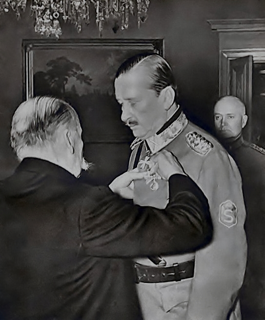 Suomen puolustuksen johtamisesta talvisodassa (1939-1940) luovutti tasavallan presidentti Kyösti Kallio puolustusvoimien ylipäällikkö Gustaf Mannerheimille 1. lk Vapaudenmitalin ruusukenauhassa (ainutkertainen) 16. toukokuuta 1940 (Suomen sisällissodan päättymisen 22-vuotispäivä)